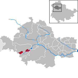 Oppershausen in Thuringia - Unstrut-Hainich-Kreis